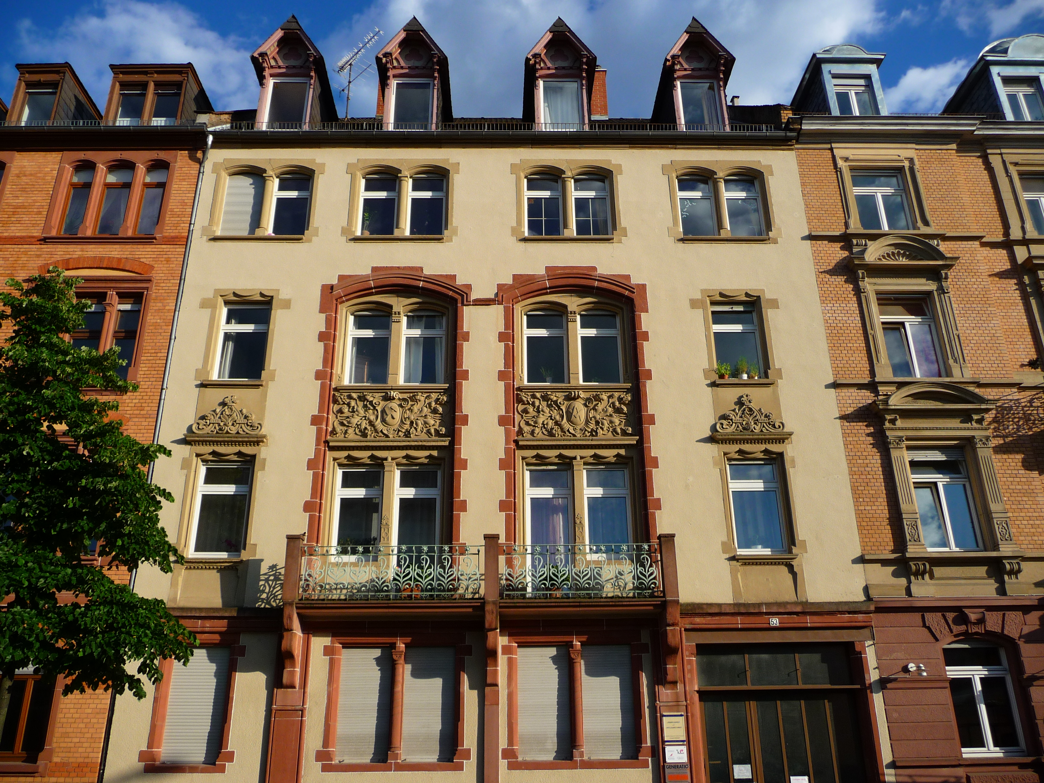 Wohnhaus am Rand des Heidelberg Stadtteils Weststadt